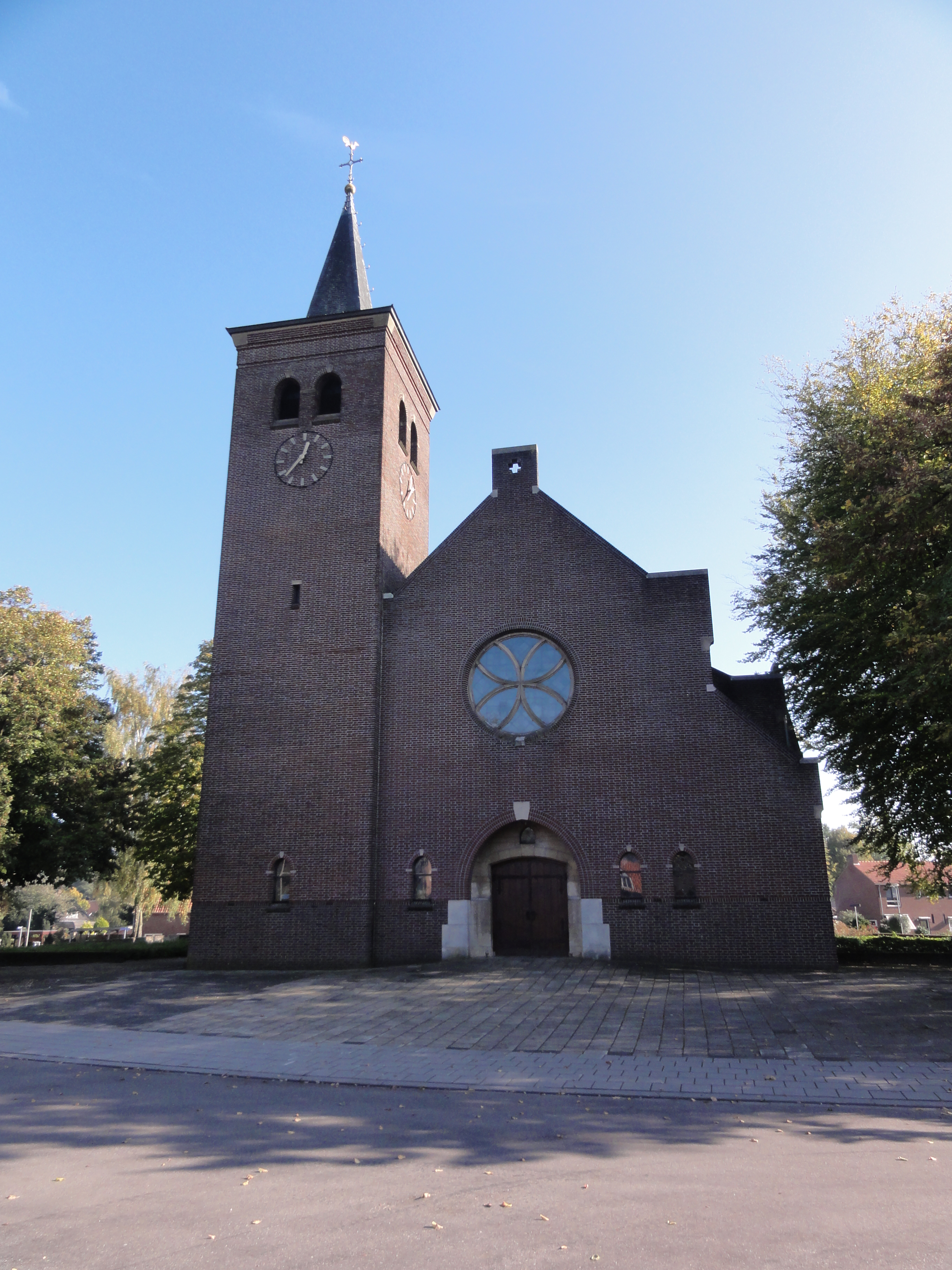 Heijen (Gennep) kerk, façade